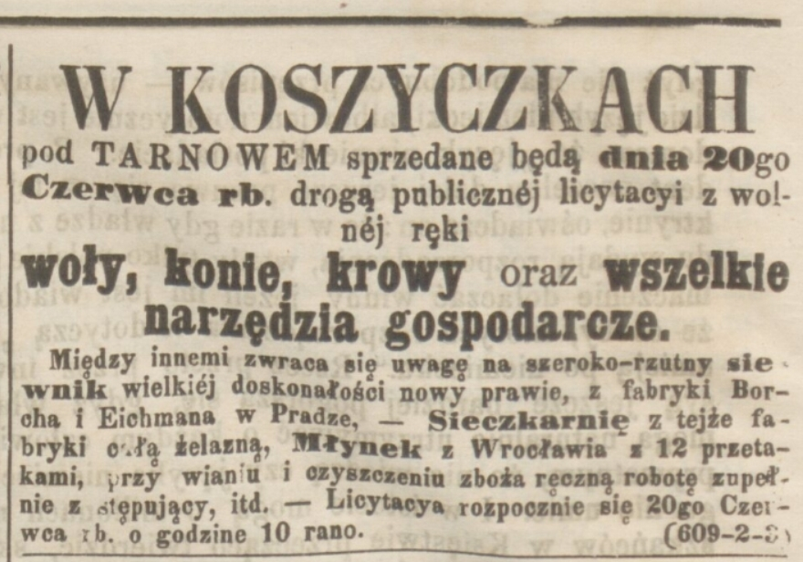 ogłoszenie licytacja rolnicza Koszyce Małe